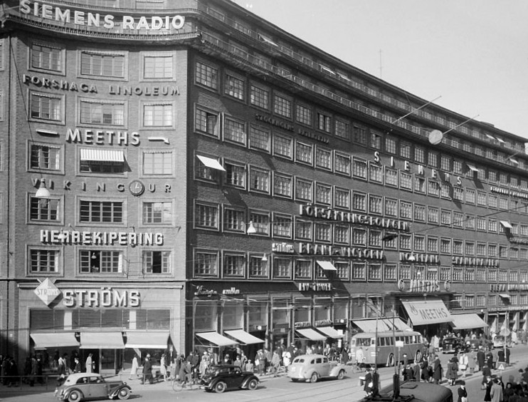 Centrumhuset med "Ströms hörna". Hörnet av Sveavägen 28 och Kungsgatan 38 (bilden är beskuren)